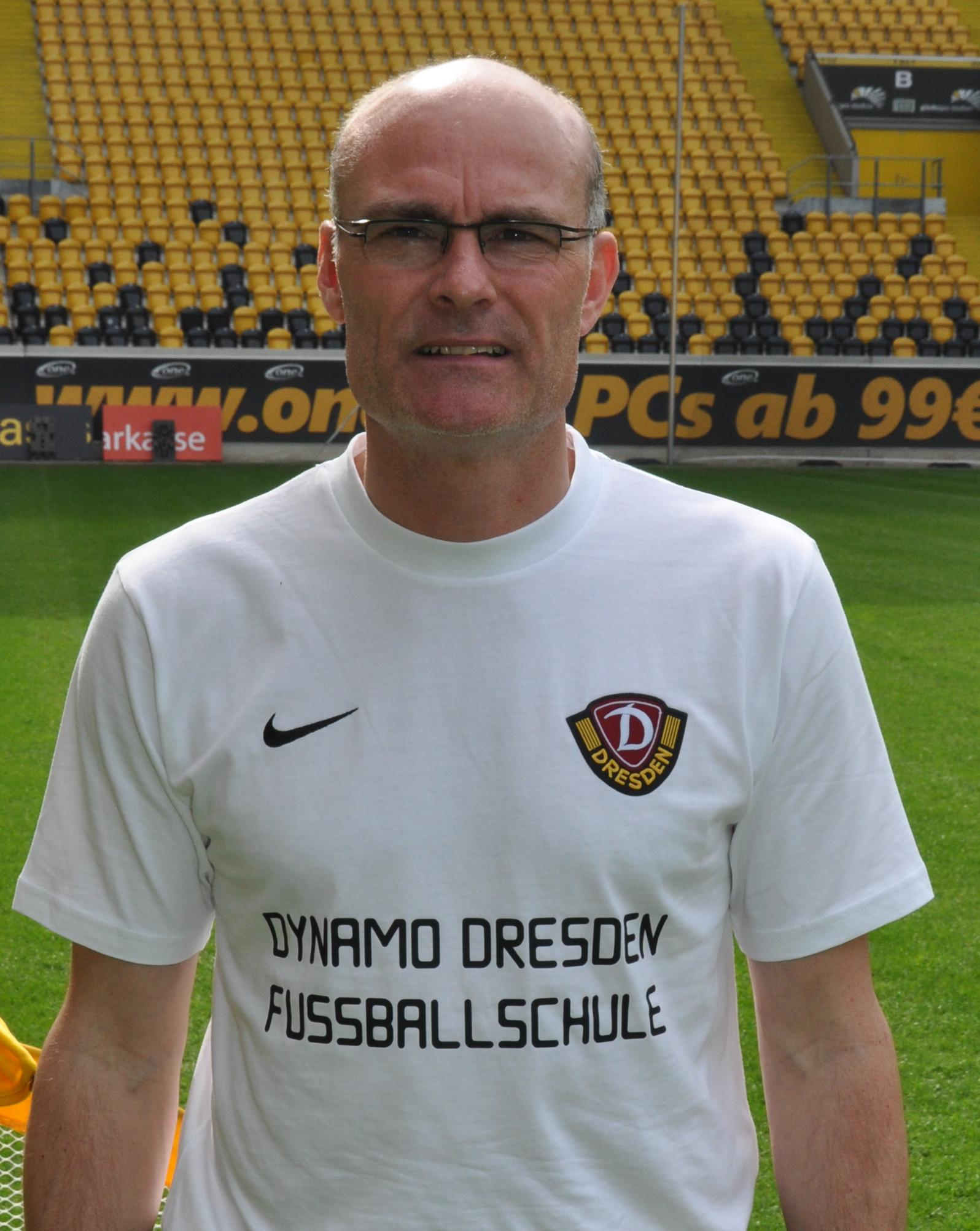 Ralf Hauptmann, Ex-Fußballprofi und Leiter der Dynamo Dresden Fußballschule